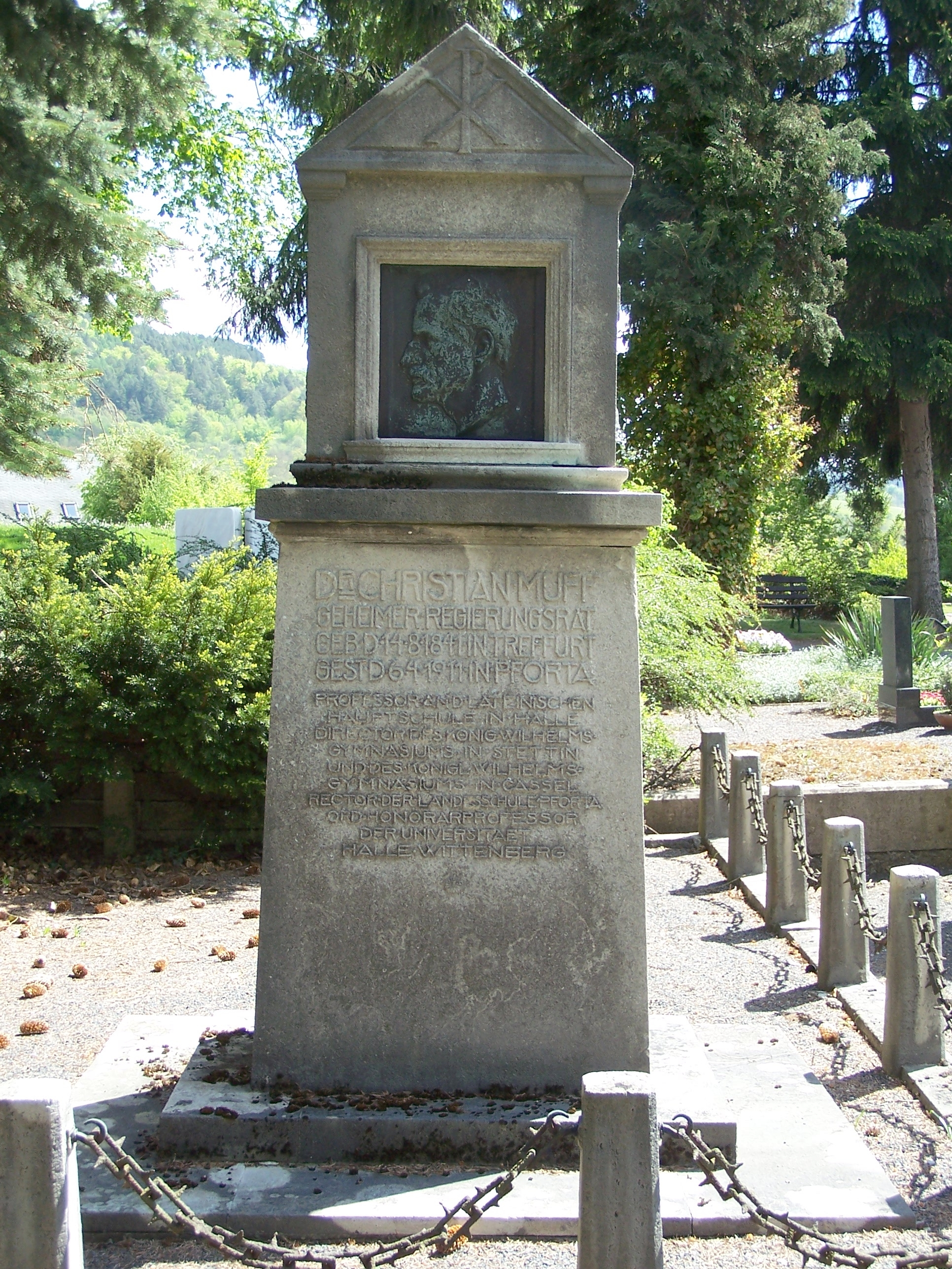 Grabmal von Christian Muff (1841-1911).